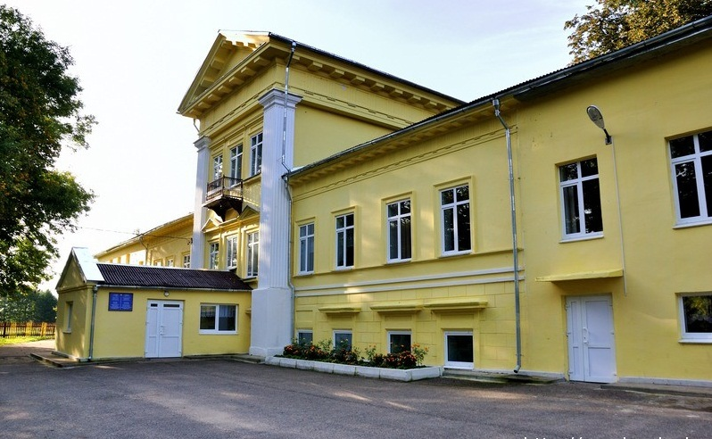 Вялікі Двор. Сядзібны дом